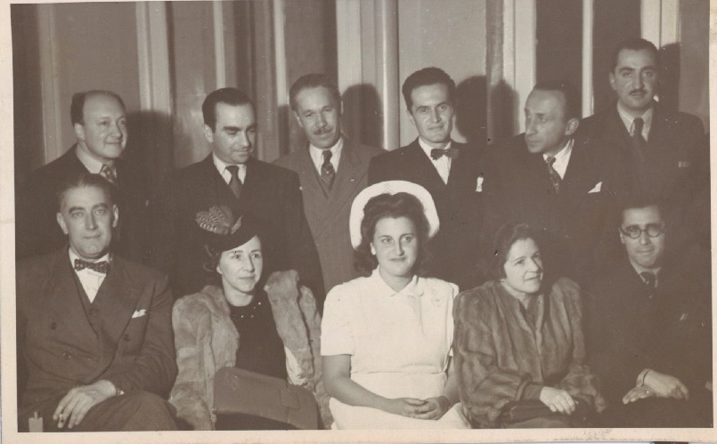 Descripción: Grado de Enfermera de Elvira Dávila Ortiz Fuente: Trabajo Propio Fecha: 3 de marzo de 1943 Autor: Joanis